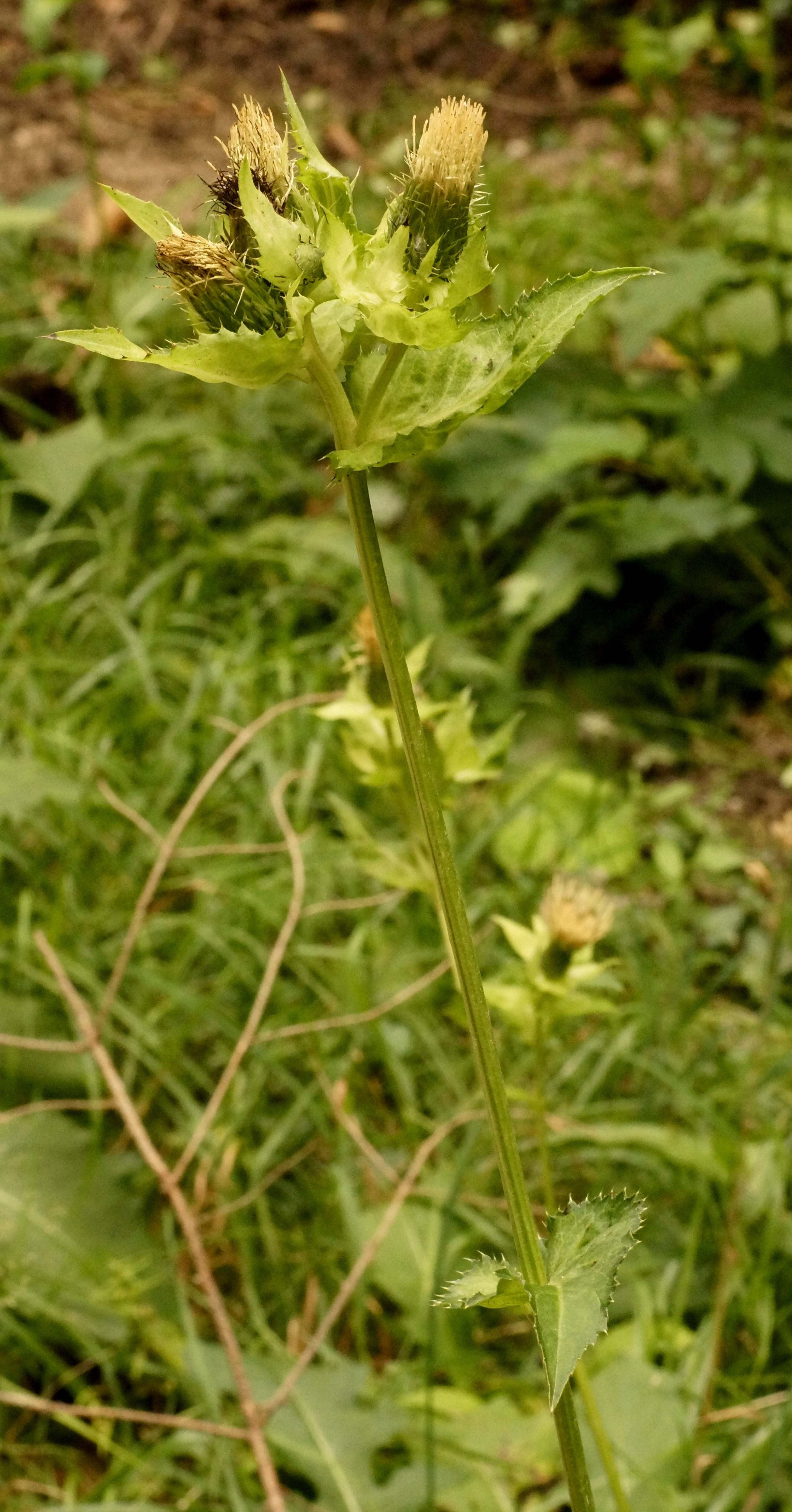 Kohl-Distel, Asteraceae, Deutschland, Oberbayern, Mittenwald, Kranzberg, 900 m Photo: U.Schmidt, 28.VIII.2012